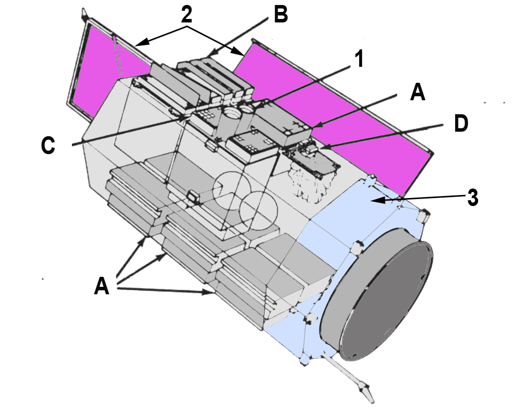 Schéma de l'observatoire spatial HEAO-1 de la NASA : A : LASS (A1) - B : CXE (A2) - A : MC (A3) - A : (A4)? - 1 : Viseurs d'étoiles - 2 : Panneaux solaires - 3 : Plateforme/bus.